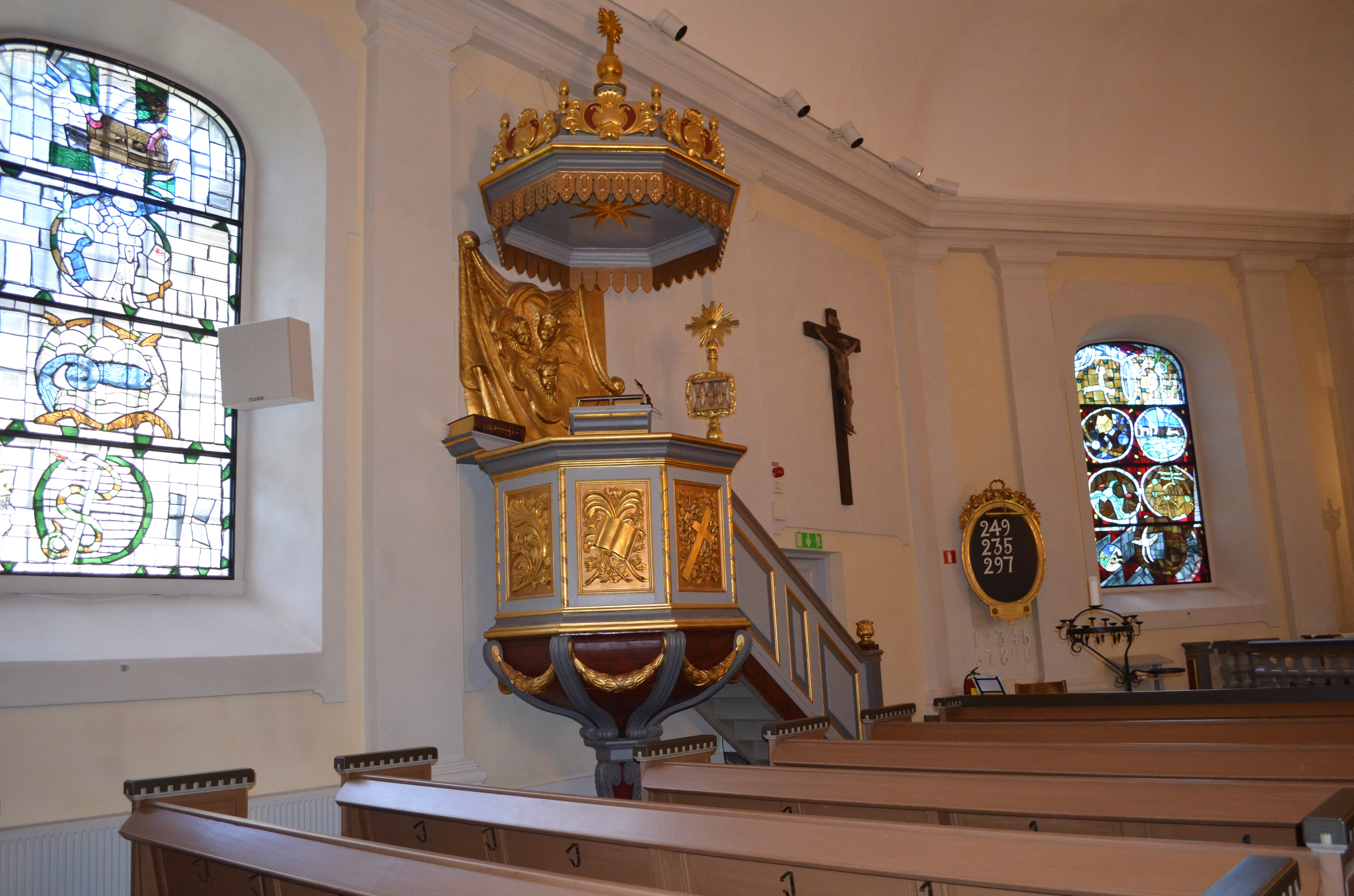 Prediktstolen